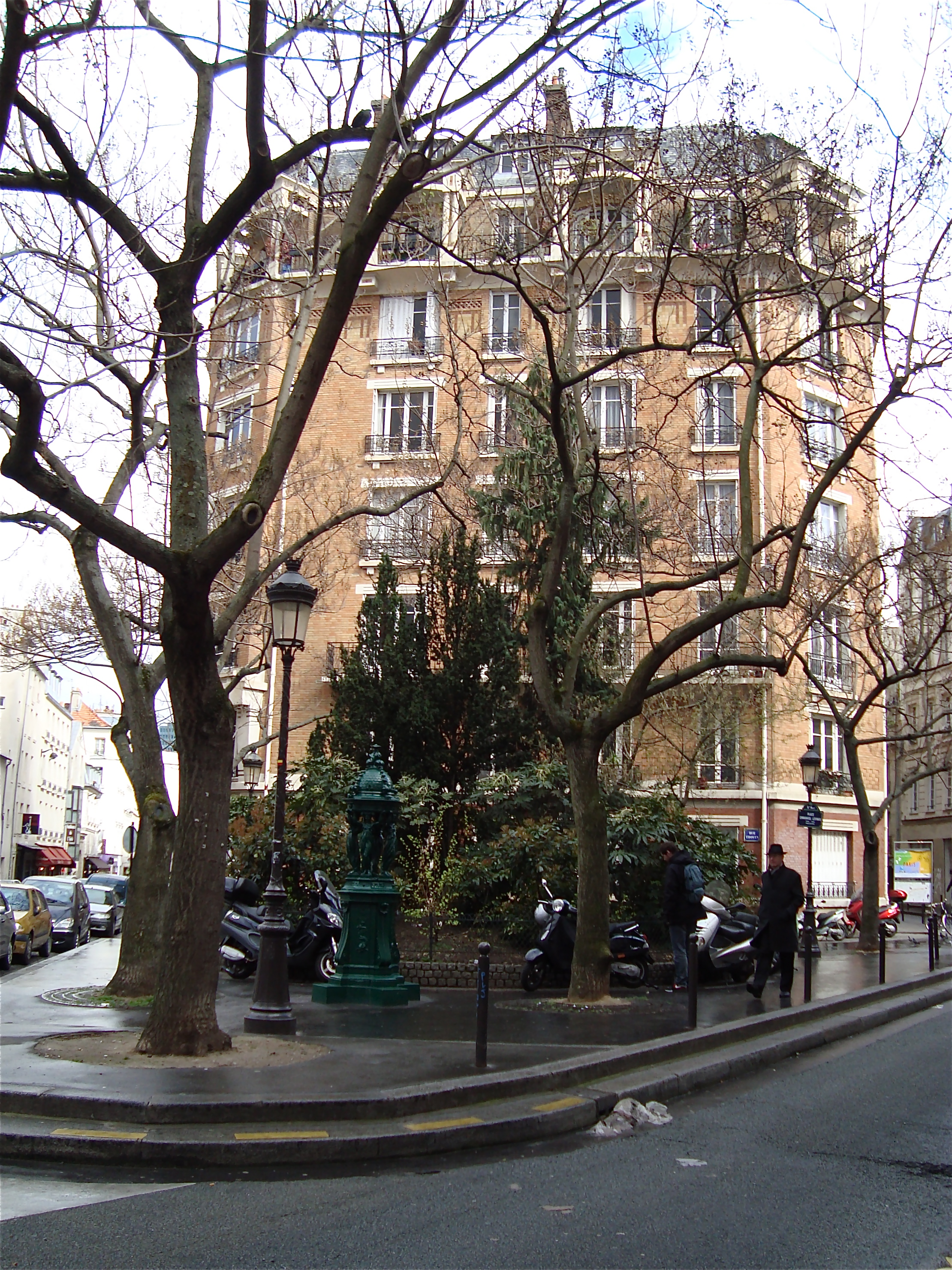 Place Emmanuel-Levinas vue depuis la rue de l'Estrapade